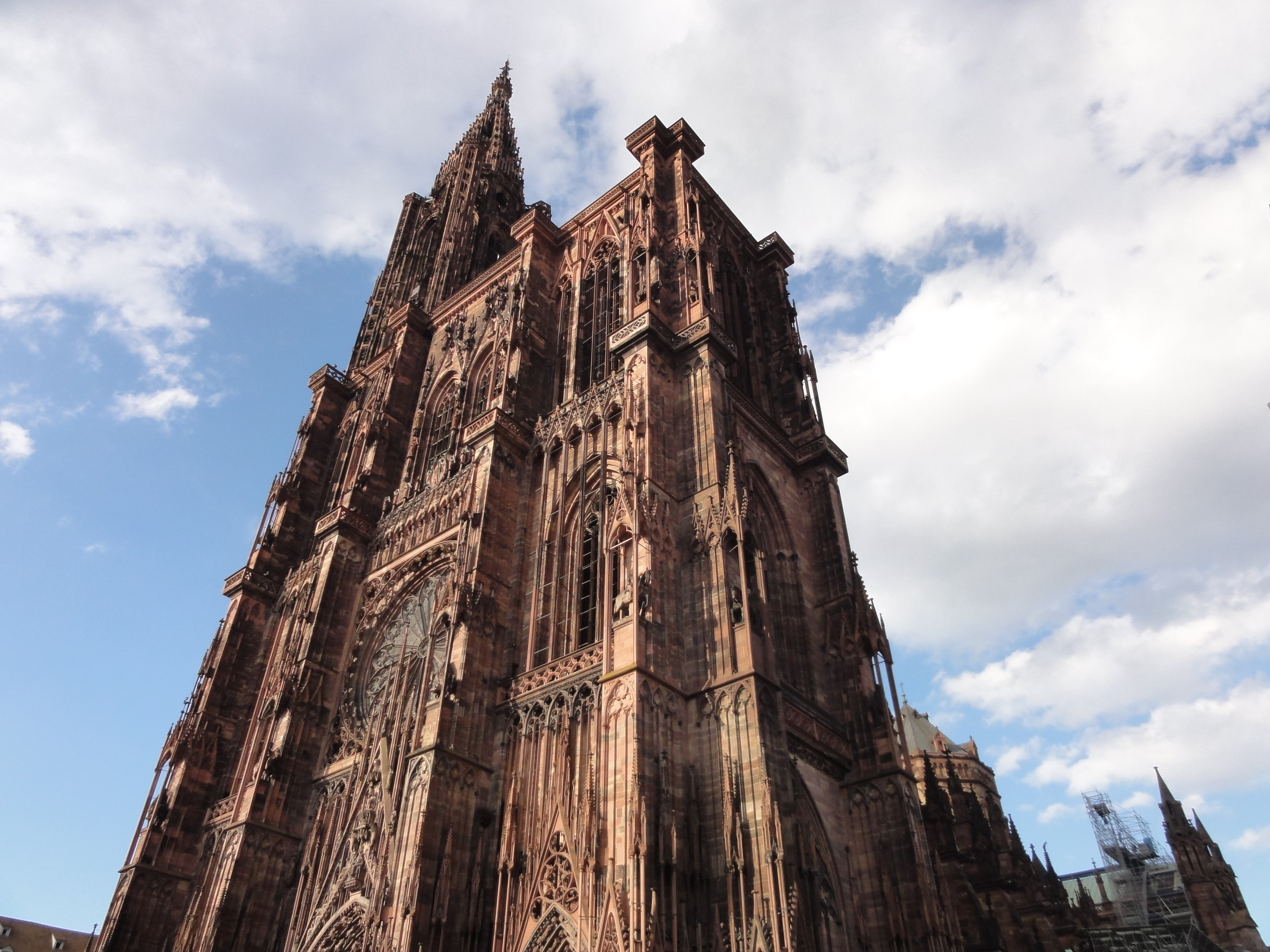 Alsace, Bas-Rhin, Cathédrale Notre-Dame de Strasbourg (PA00085015).